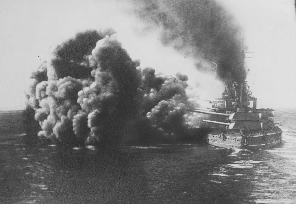 bei der Beschießung der Insel Ösel.